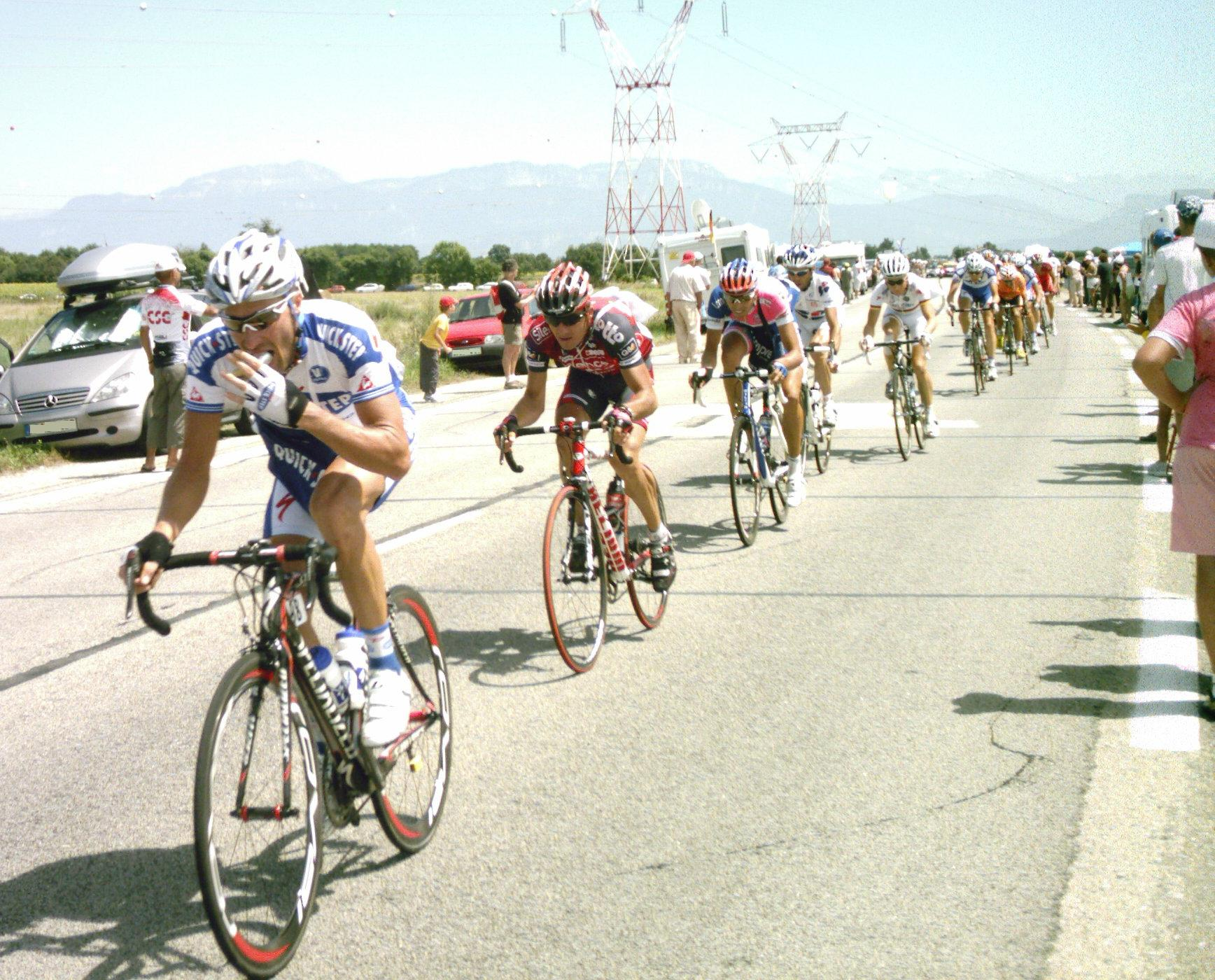 Le peloton dans la zone de ravitaillement lors de la 18e étape du Tour de France 2008.